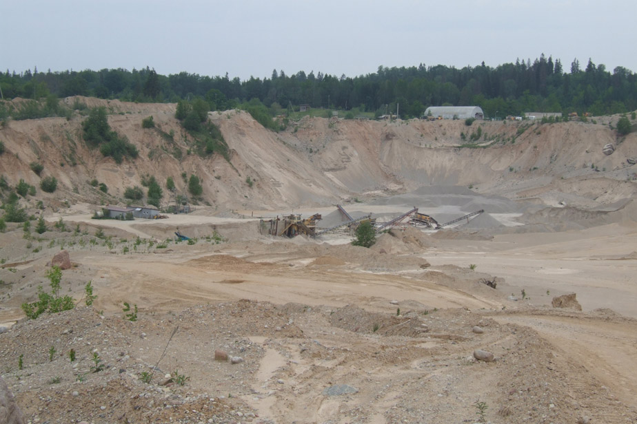 Lejaslabiņu karjers, 27.05.2007.